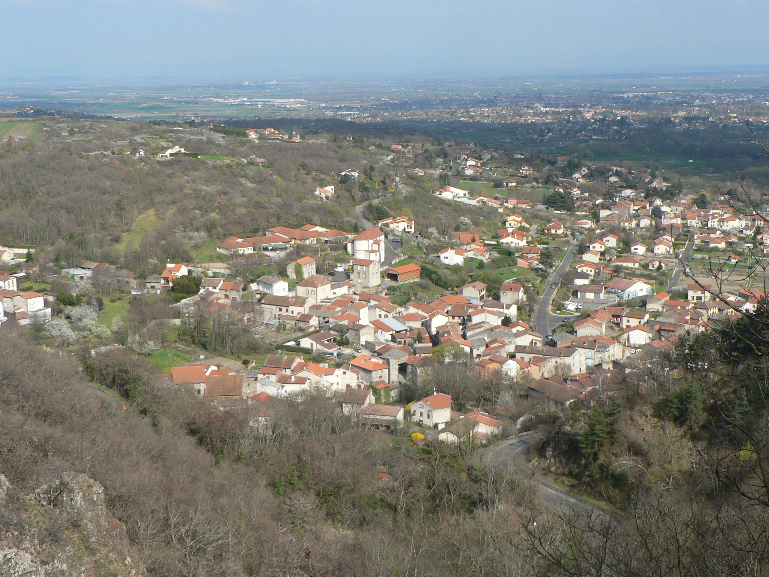 Bourg d'Enval (Puy-de-Dôme, France) vu depuis les gorges d'Enval.